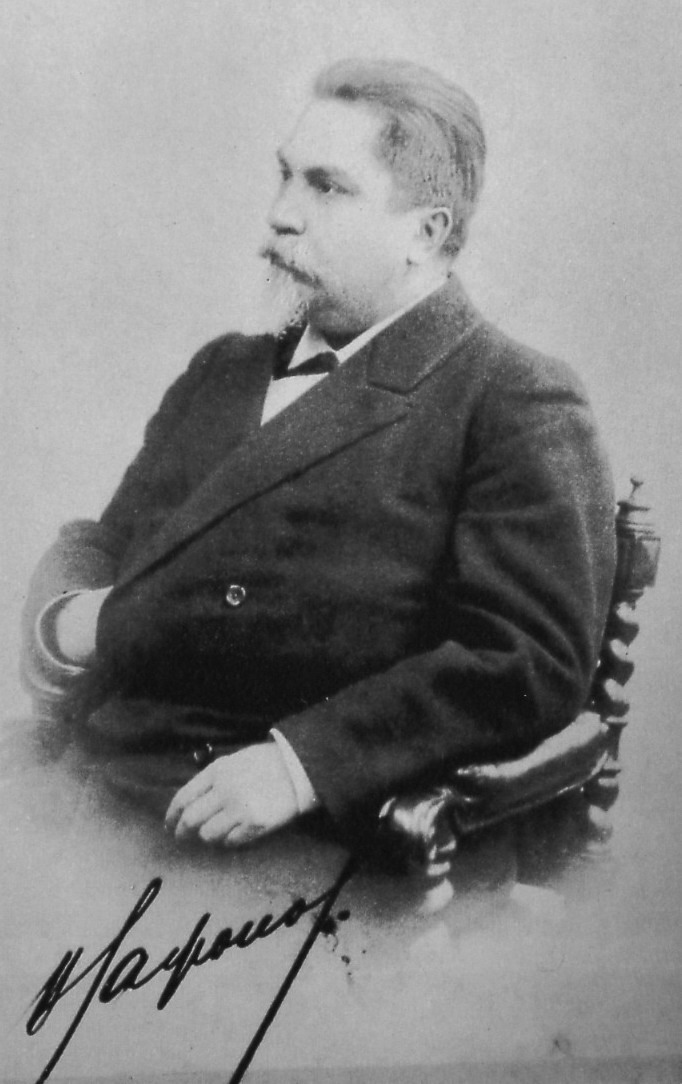 Василий Ильич Сафонов 1898 (пианист, профессор, директор Московской консерватории)